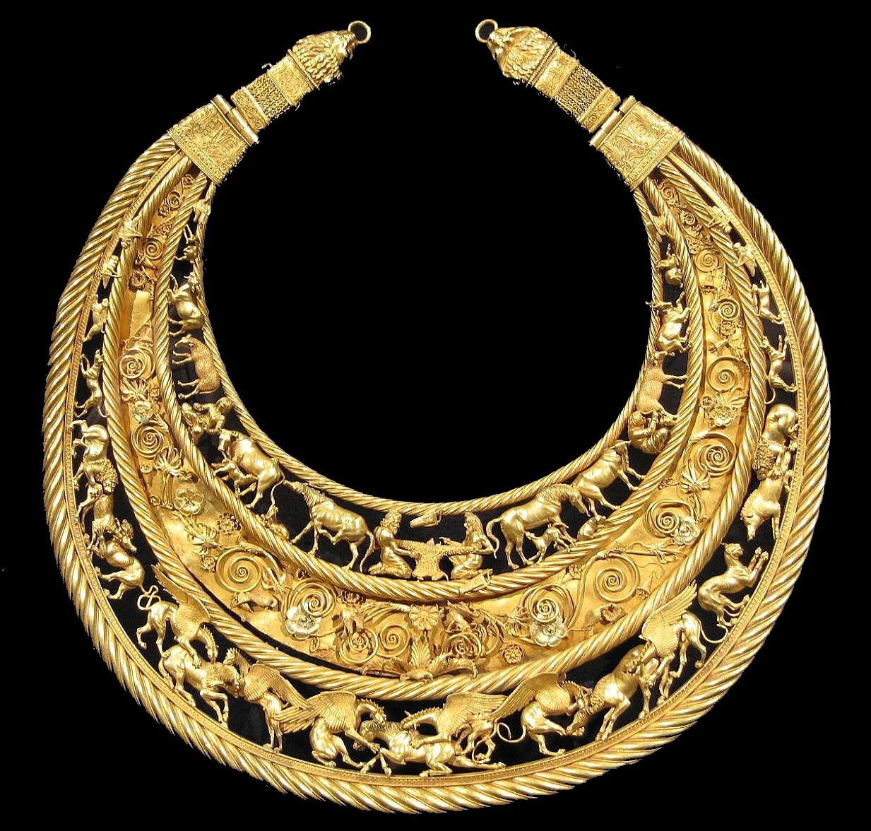 Золота пектораль. IV століття до н. е. Товста Могила